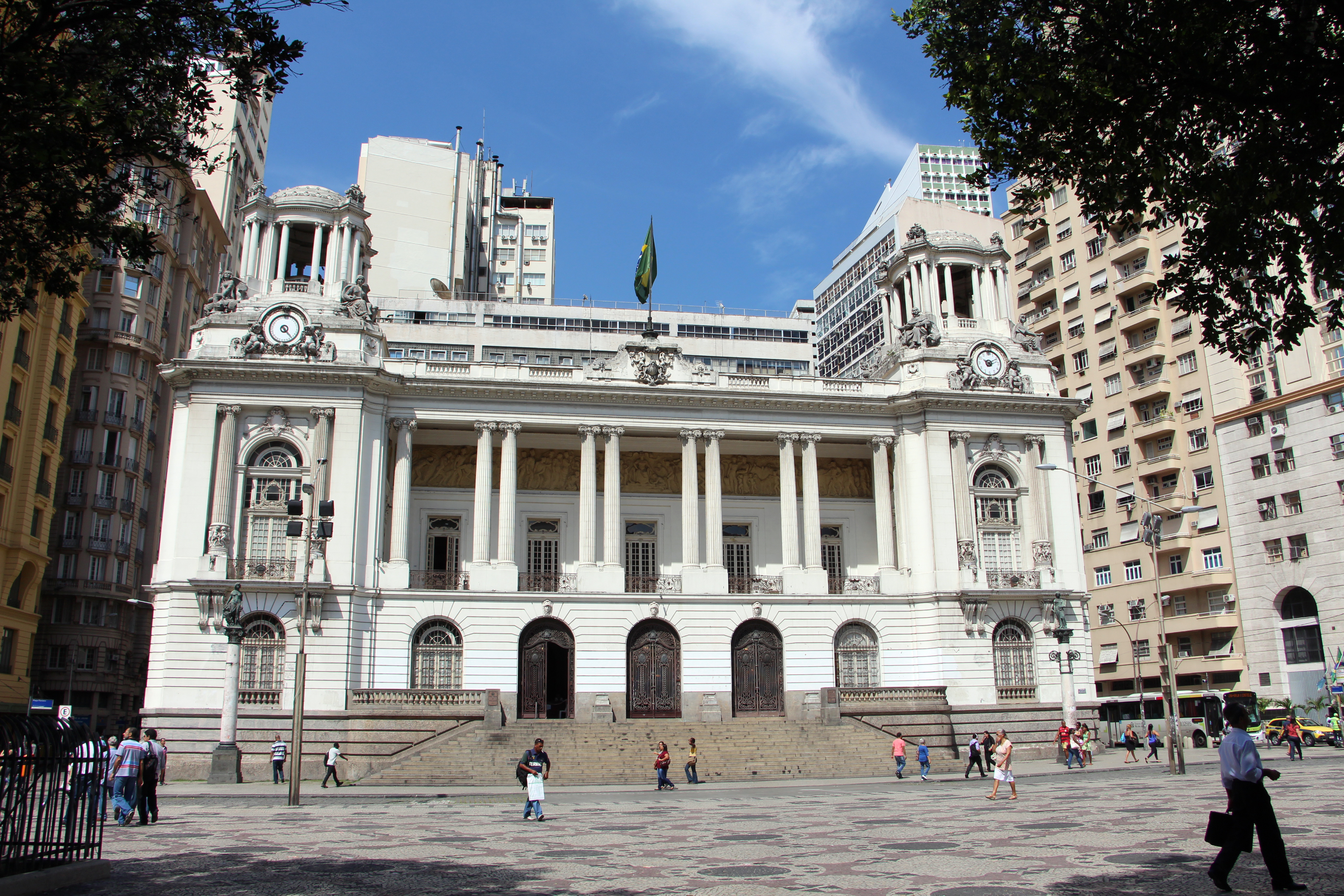 Rio de Janeiro